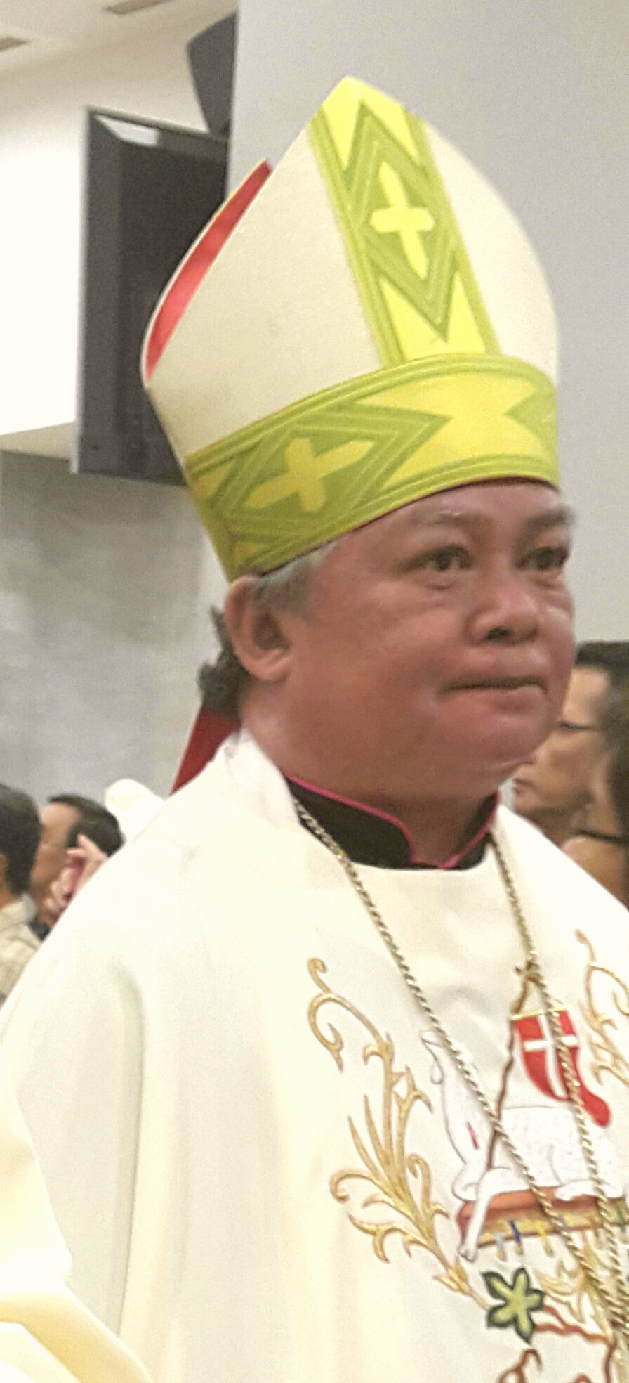 Mgr Hilarion Datus Lega, Uskup Manokwari-Sorong